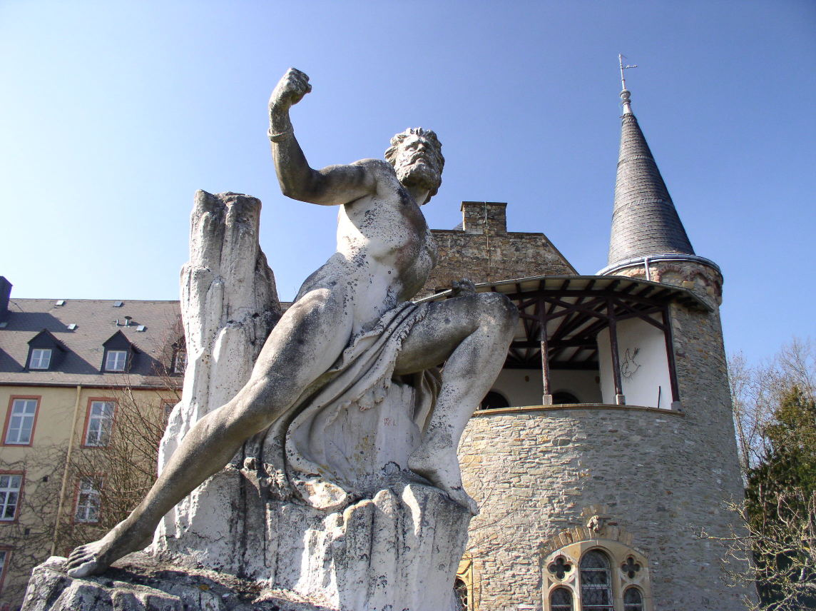 Prometheus von Robert Cauer dem Älteren im Park von Schloss Dhaun